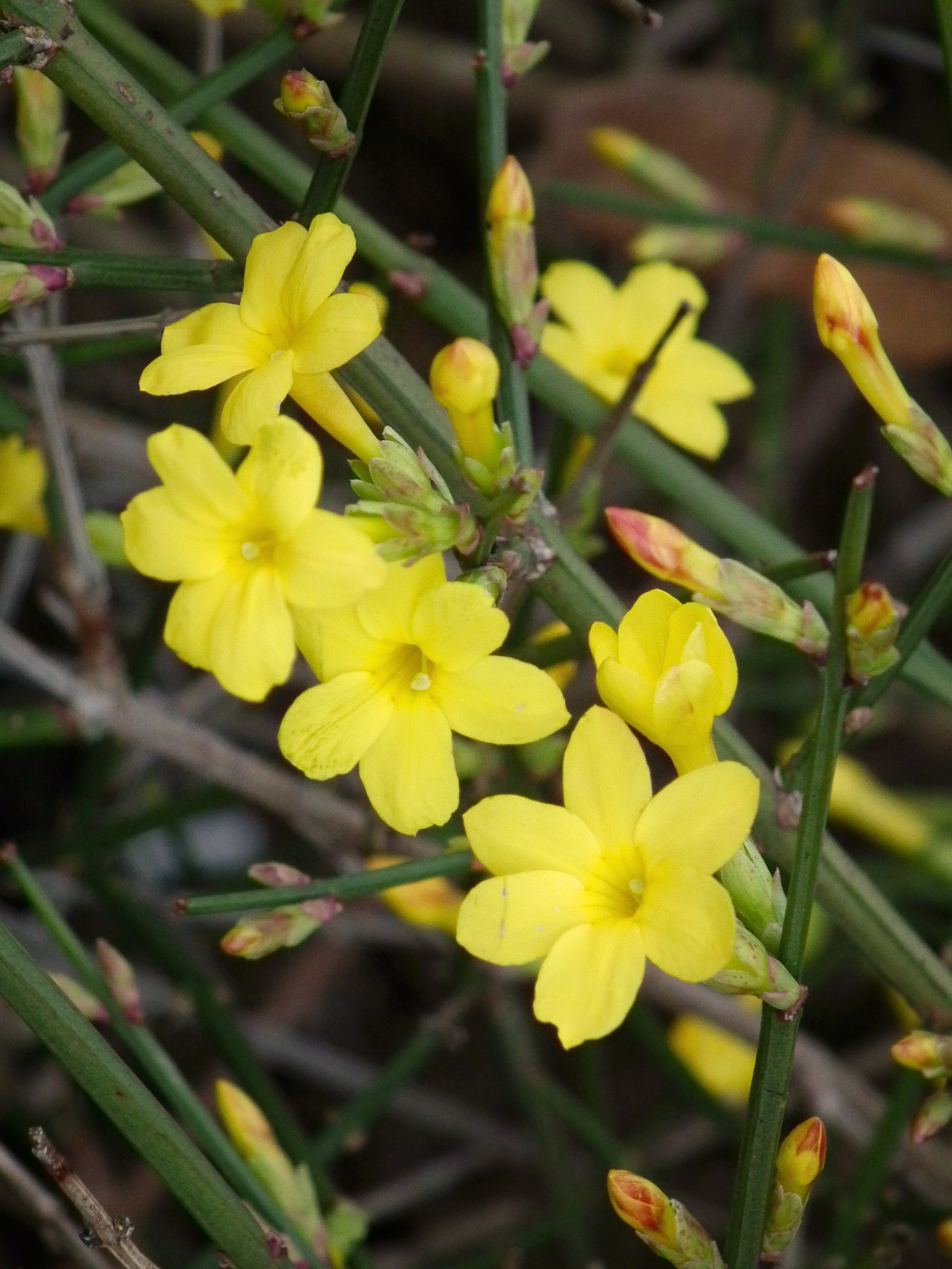 Blüten des Echten Winterjasmin (Jasminum nudiflorum) in Heidelberg (Baden-Württemberg, Deutschland)